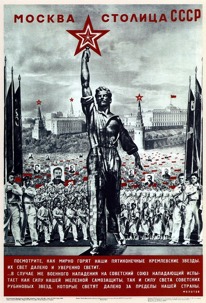 Плакат 1940 года, "Москва - столица СССР".